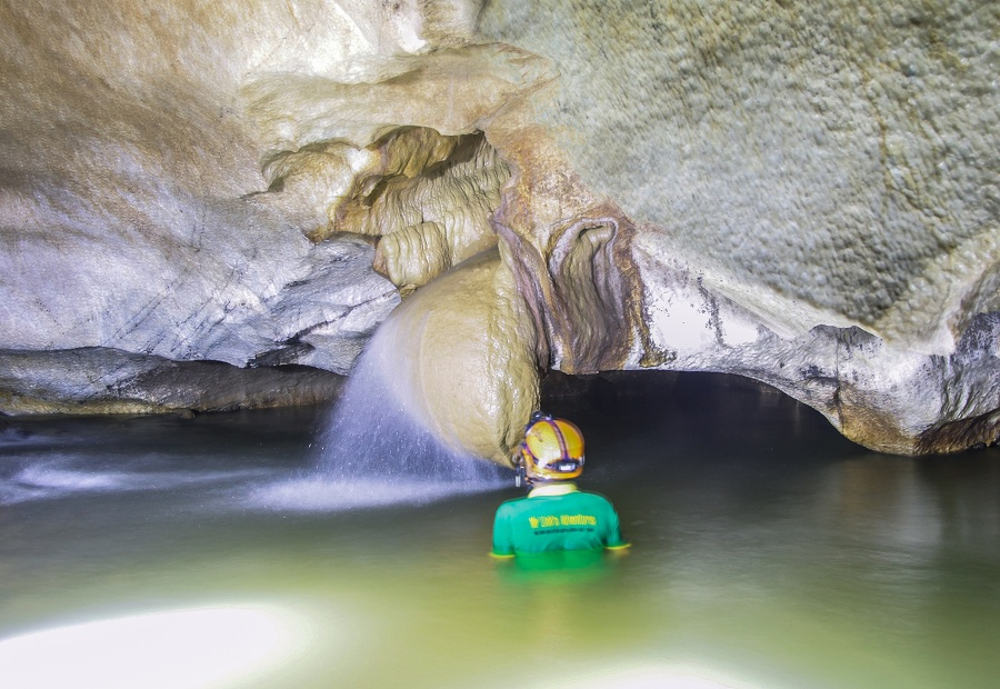 Hua ma cave